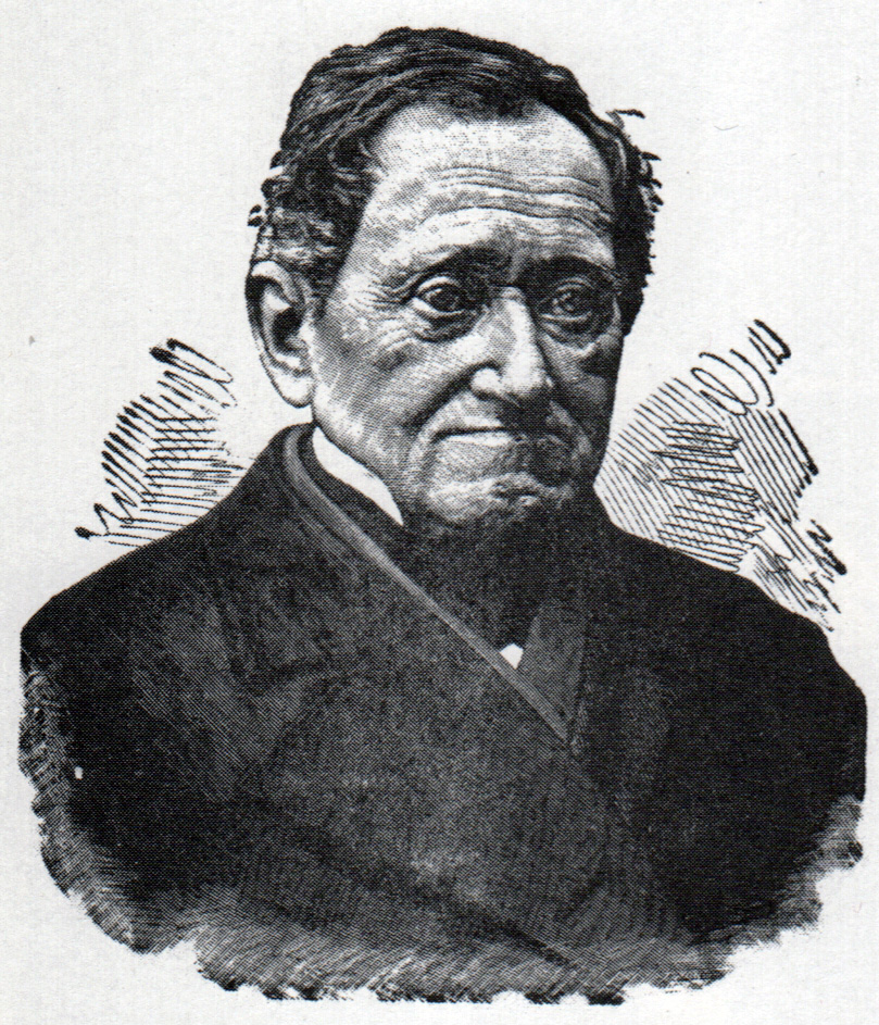 Johan Fredrik Meyer (1806-1893). Published in Ny illustrerad tidning 1893:51-52.